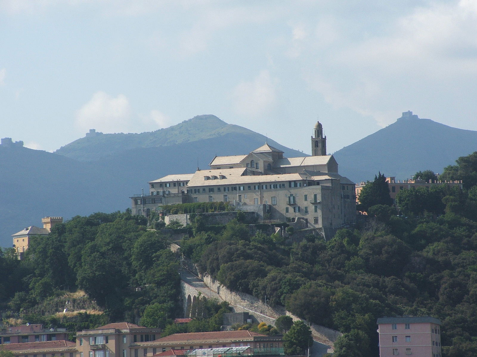 Genova, panorama dal quartiere di Albaro sul Santuario della Madonna del Monte